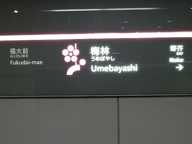 福岡市地下鉄七隈線梅林駅の駅名標